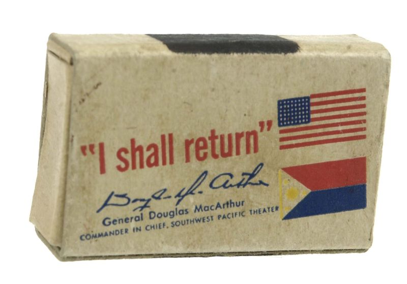 Luciferdoos. Op dit luciferdoosje met Amerikaanse propaganda van tijdens de Tweede Wereldoorlog staat een Amerikaanse vlag met het opschrift :"I shall return" en daaronder de handtekening van general Douglas MacArthur, commander in chief, Southwest Pacific Theater. Als reactie op de goed geoliede propaganda-machine van de Japanners, kwamen de geallieerden met tegenpropaganda om sabotage af te wenden. Luciferdoos met propaganda-opschrift